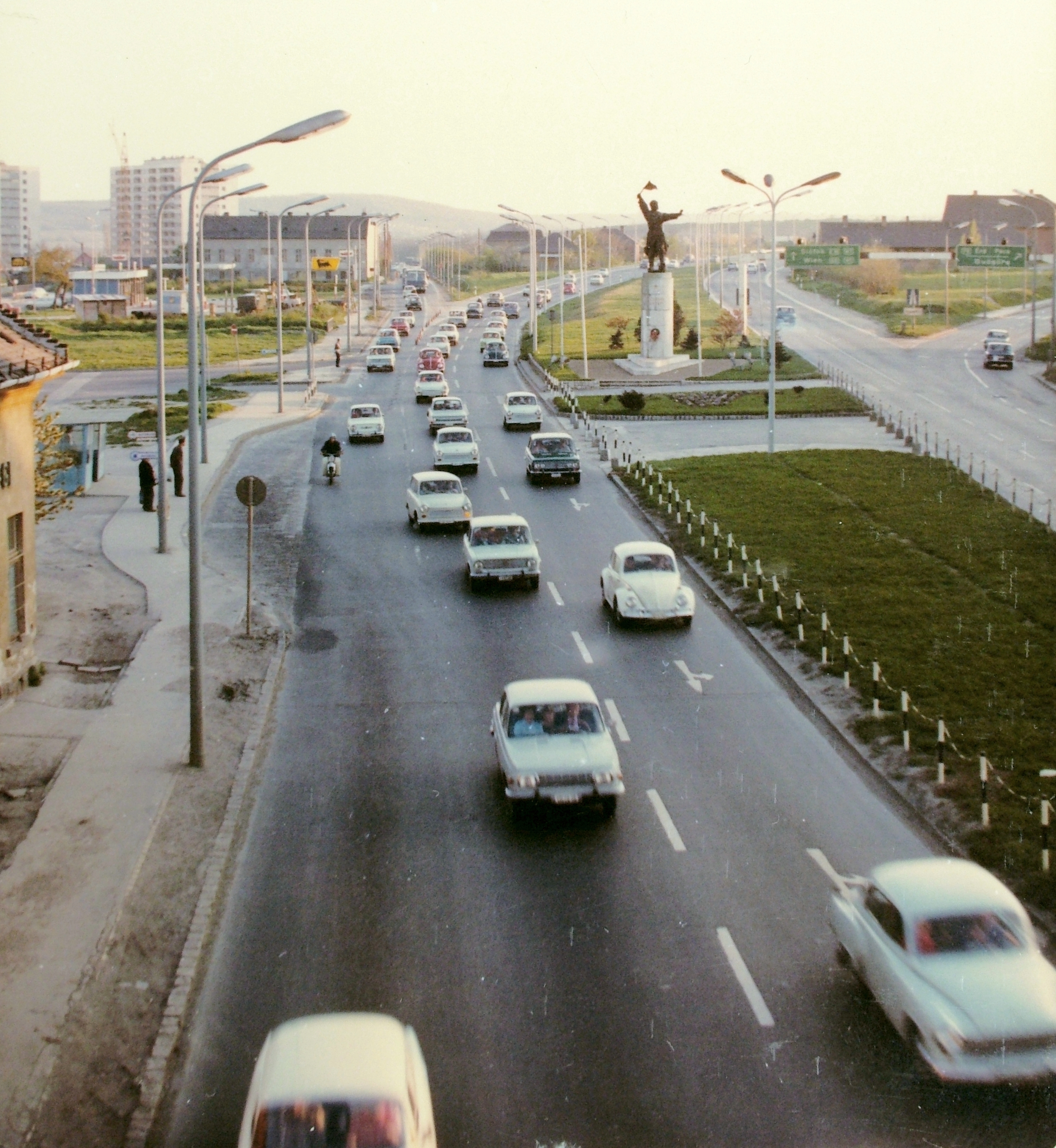 Budaörsi út. Szemben az Osztapenko szobor a Balatoni út és az M1-M7 közös szakaszának találkozásánál. Location: Hungary, Budapest XI. Tags: automobile, colorful, sculpture, traffic, transport, gas station, construction, Volkswagen Beetle, Volkswagen-brand, Agip-brand, Budapest Title: Budaörsi út. Szemben az Osztapenko szobor a Balatoni út és az M1-M7 közös szakaszának találkozásánál.